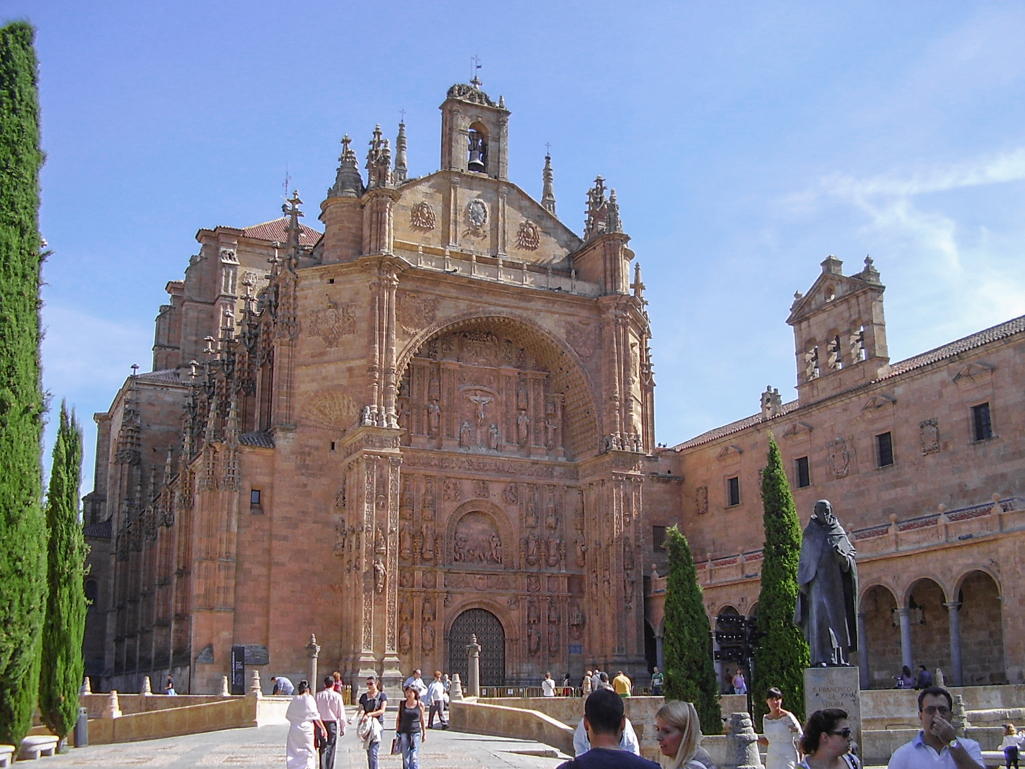 Salamanca ,Convento de San Esteban